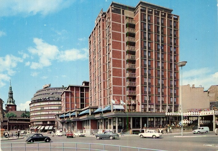 Hotell Viking sett fra øst. Gunnerus' gate opp mot nye Doublouggården og Kirkeristen. Domkirkespiret. Nygata inn til høyre. Biler. Postkort.